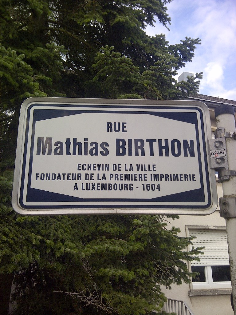 Stroosseschëld an der Stad Lëtzebuerg